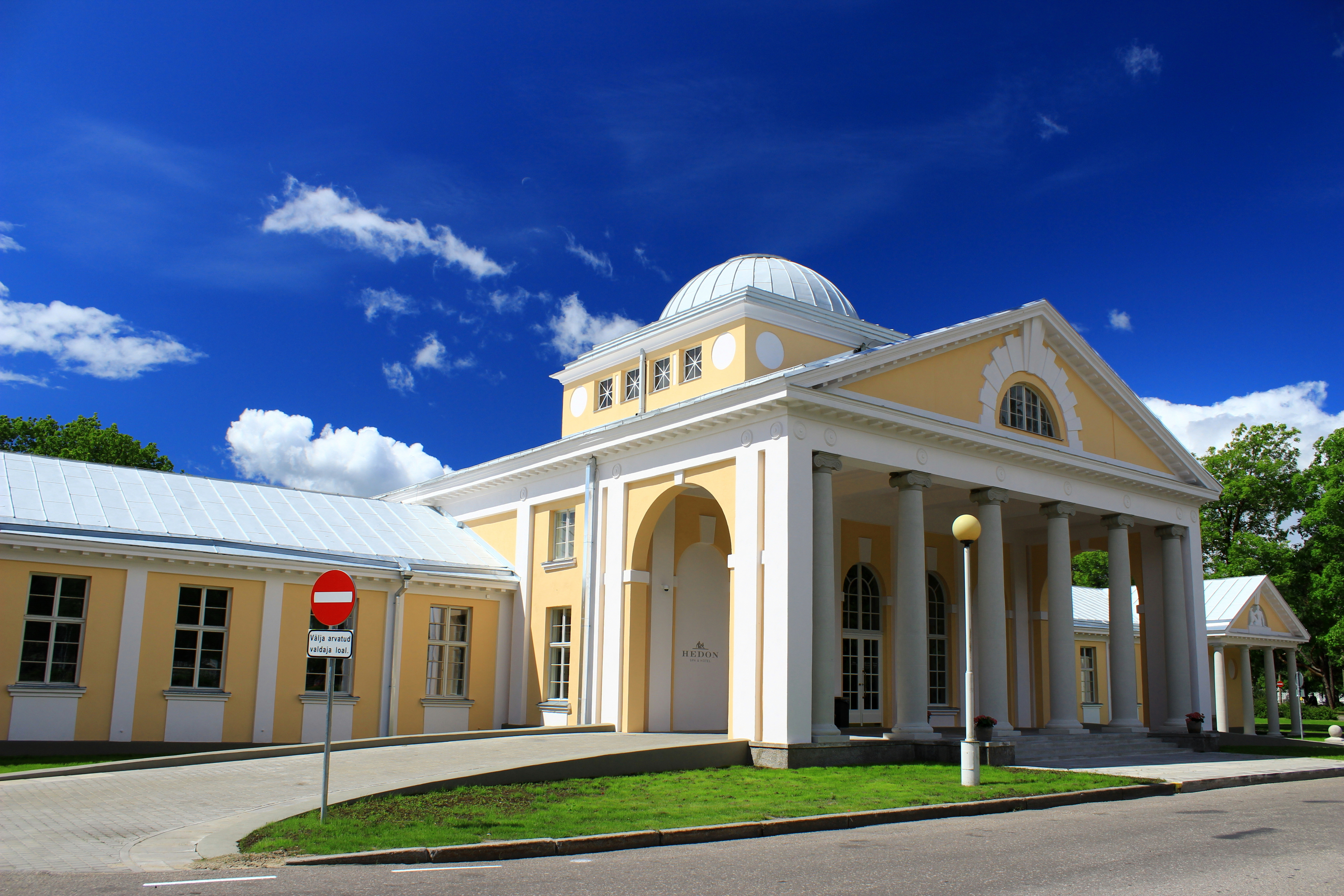 Pärnu